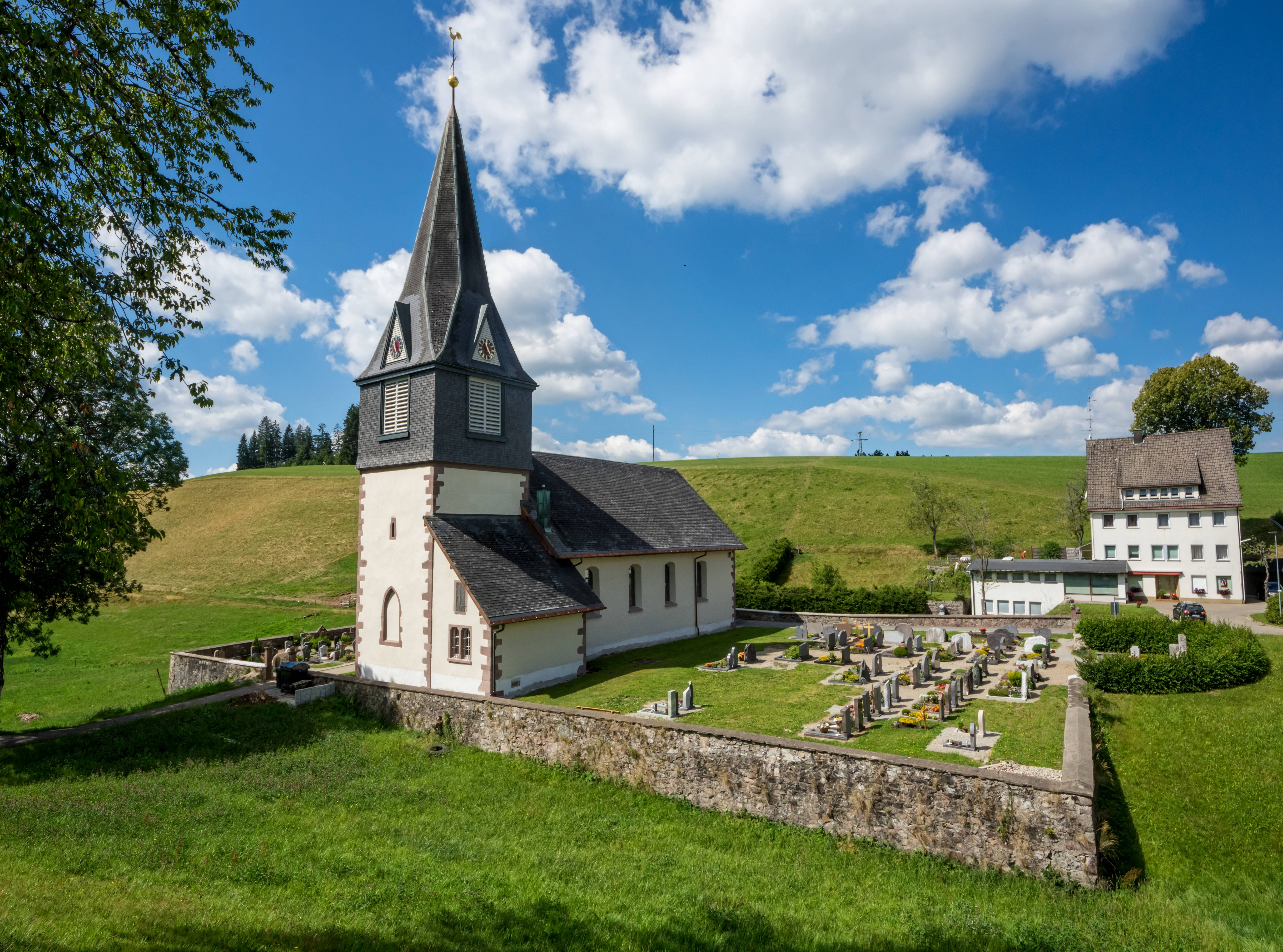 St. Andreas in Furtwangen Neukirch Außenansichten